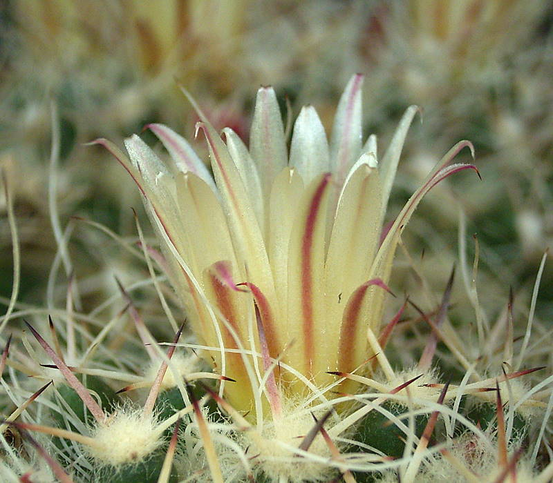 Mammillaria karwinskiana ssp. nejapensis